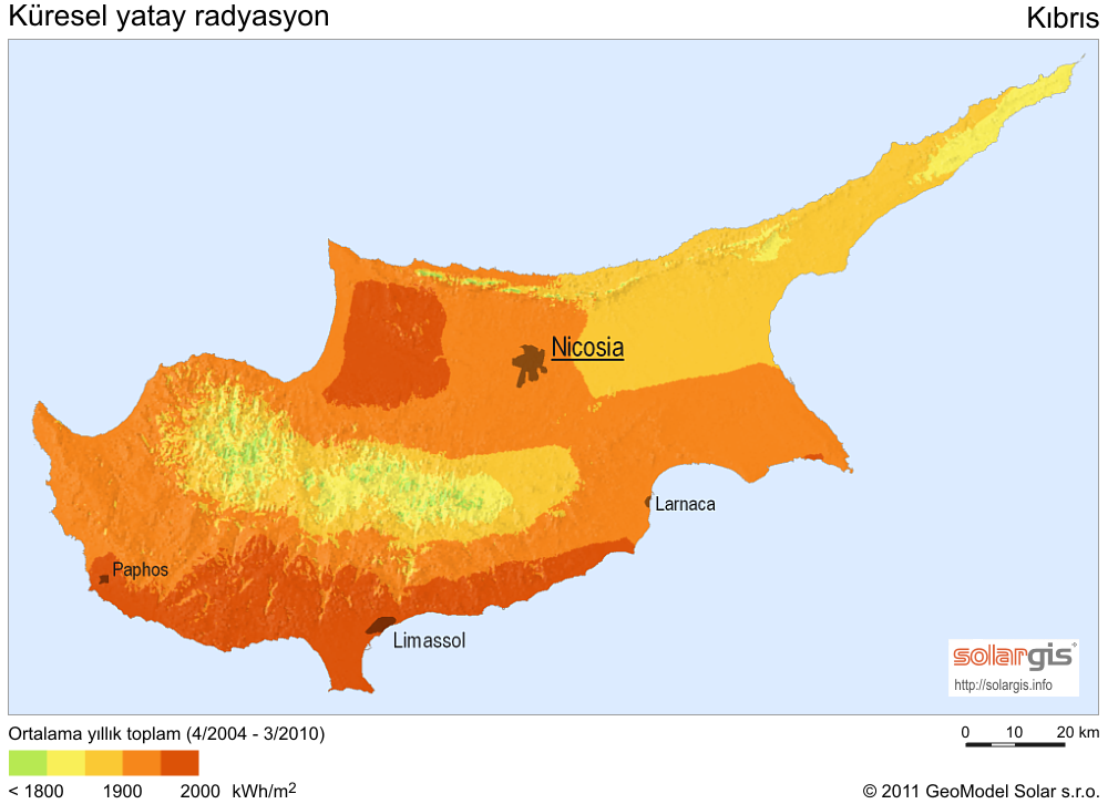 Solar Radiation Map: Kuresel Yatay Radyasyon, Cyprus, SolarGIS 2011